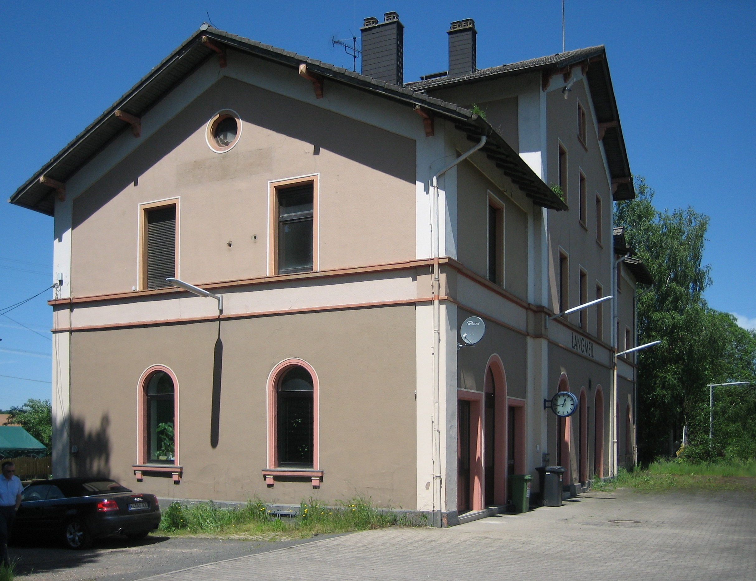 Empfangegebäude des Bf. Langmeil (Pfalz)